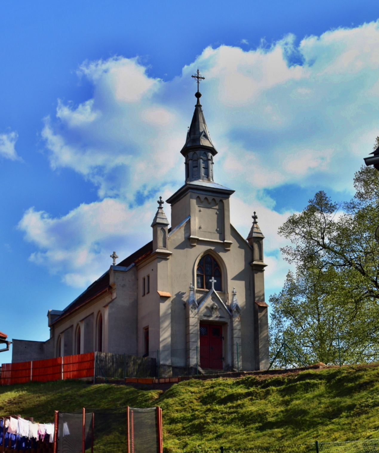 Evangelický kostelík (Jablonné v Podještědí)